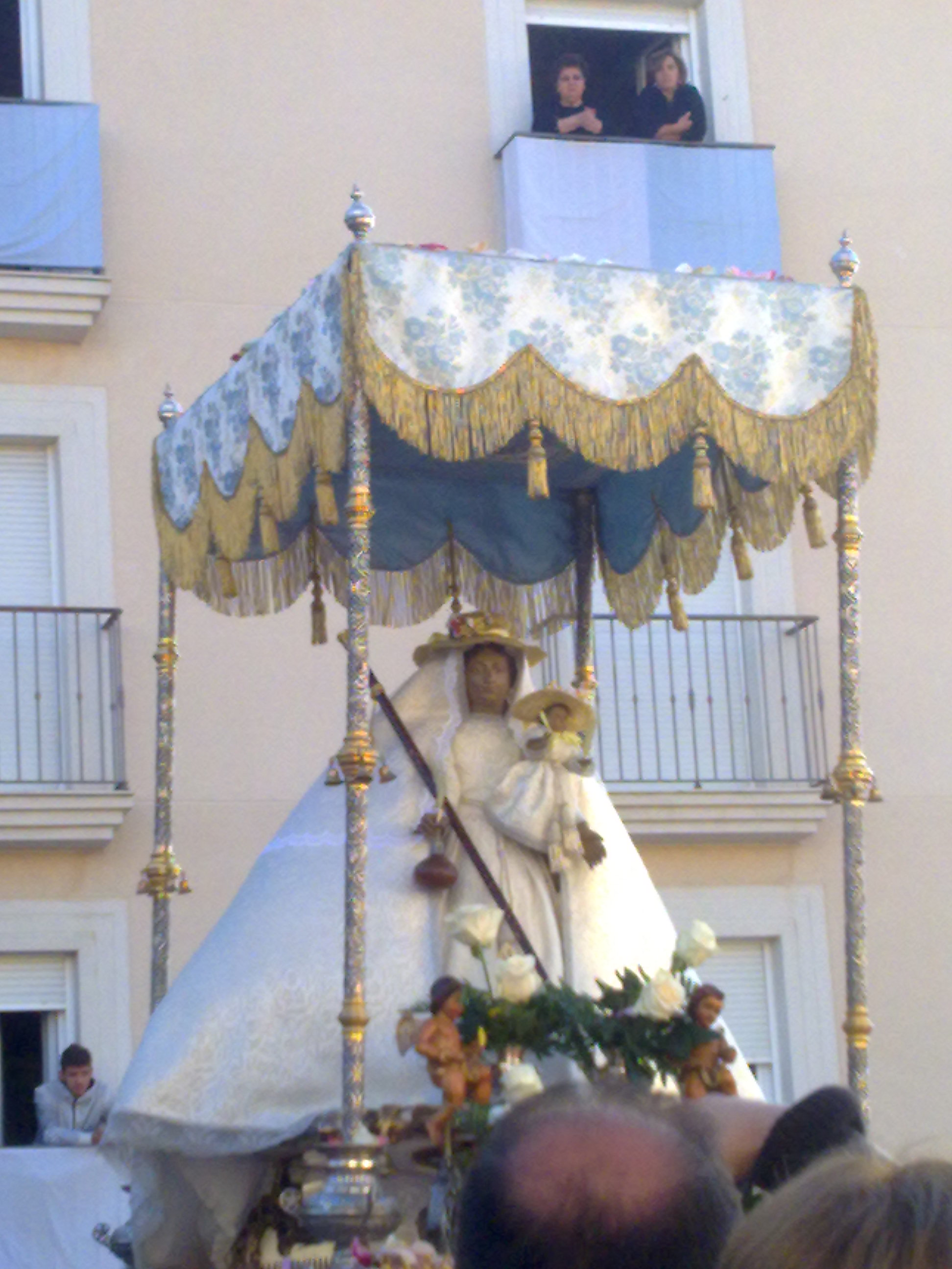 Rezo de la Salve a la virgen de argeme en la avenida. Romeria de 2011.